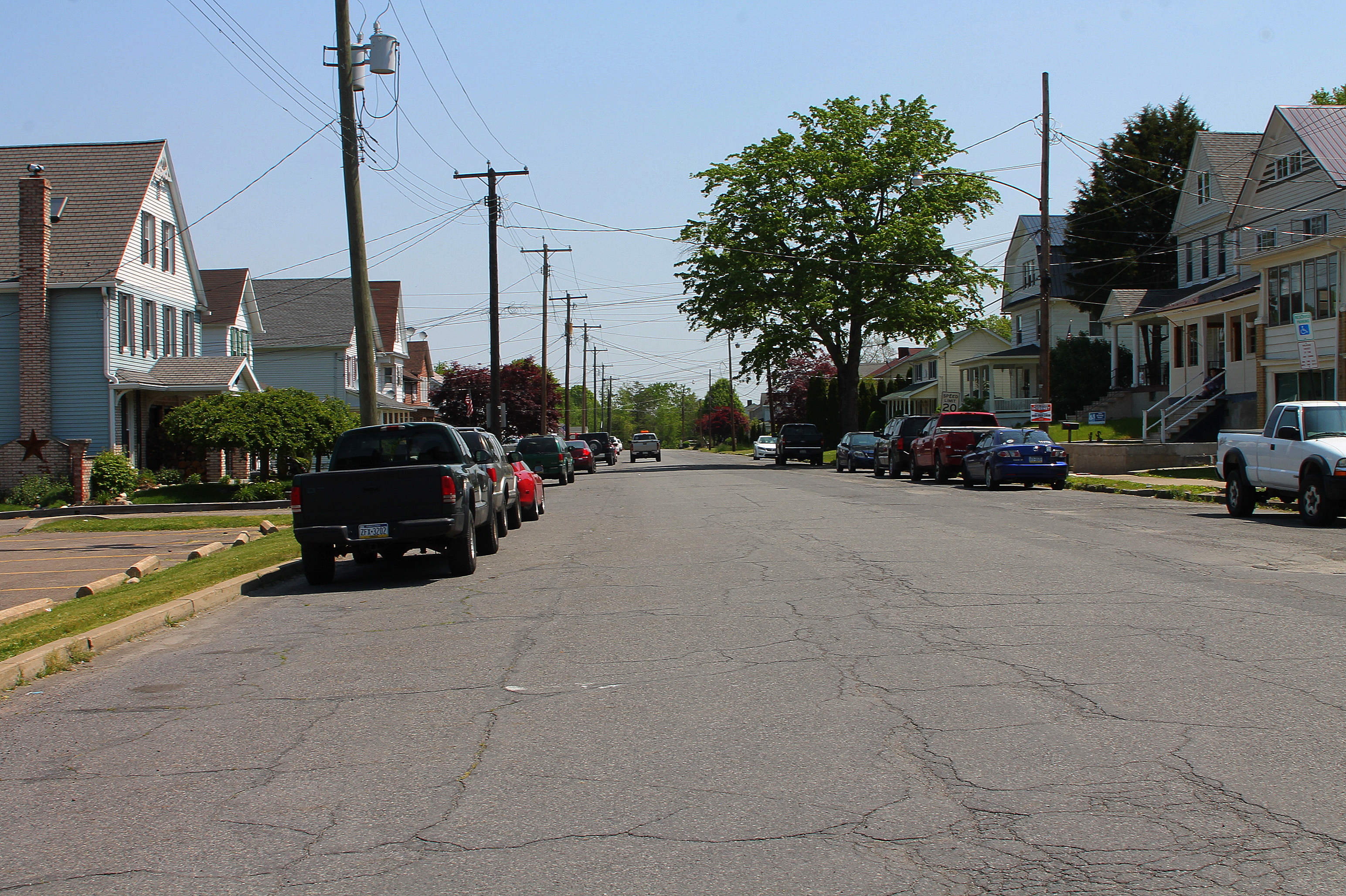 Street in Wanamie, Pennsylvania.